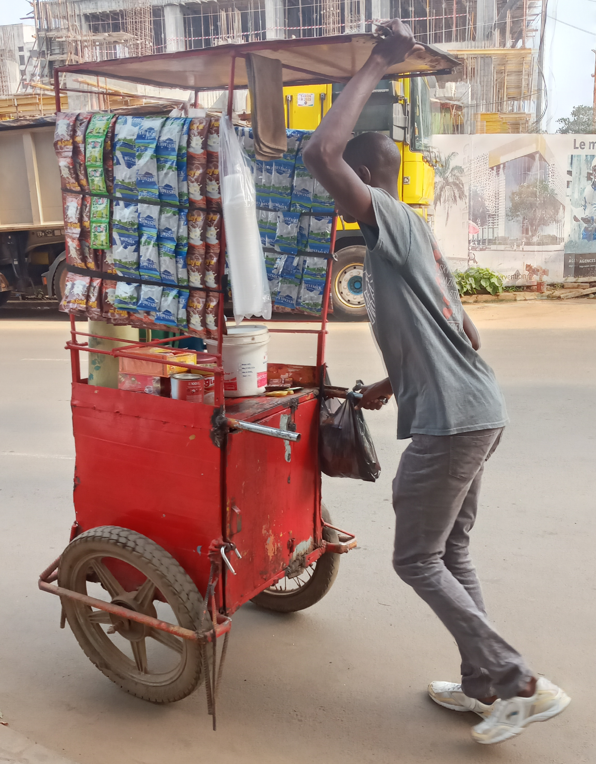 Vendeur de café sur la route Kipé-taouyah This is an image with the theme "Africa on the Move or Transport" from: Guinea